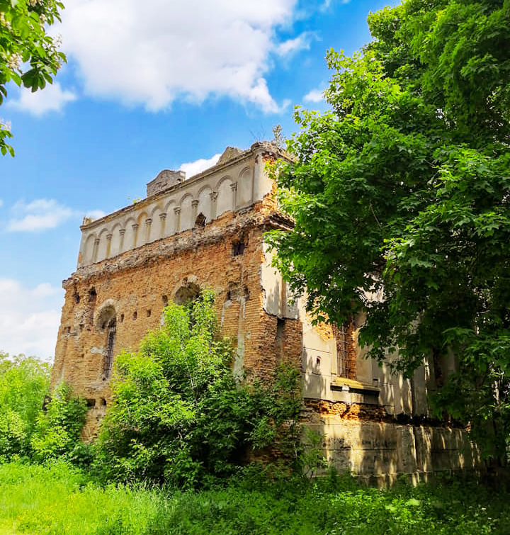 Стара Синагога, Сокаль